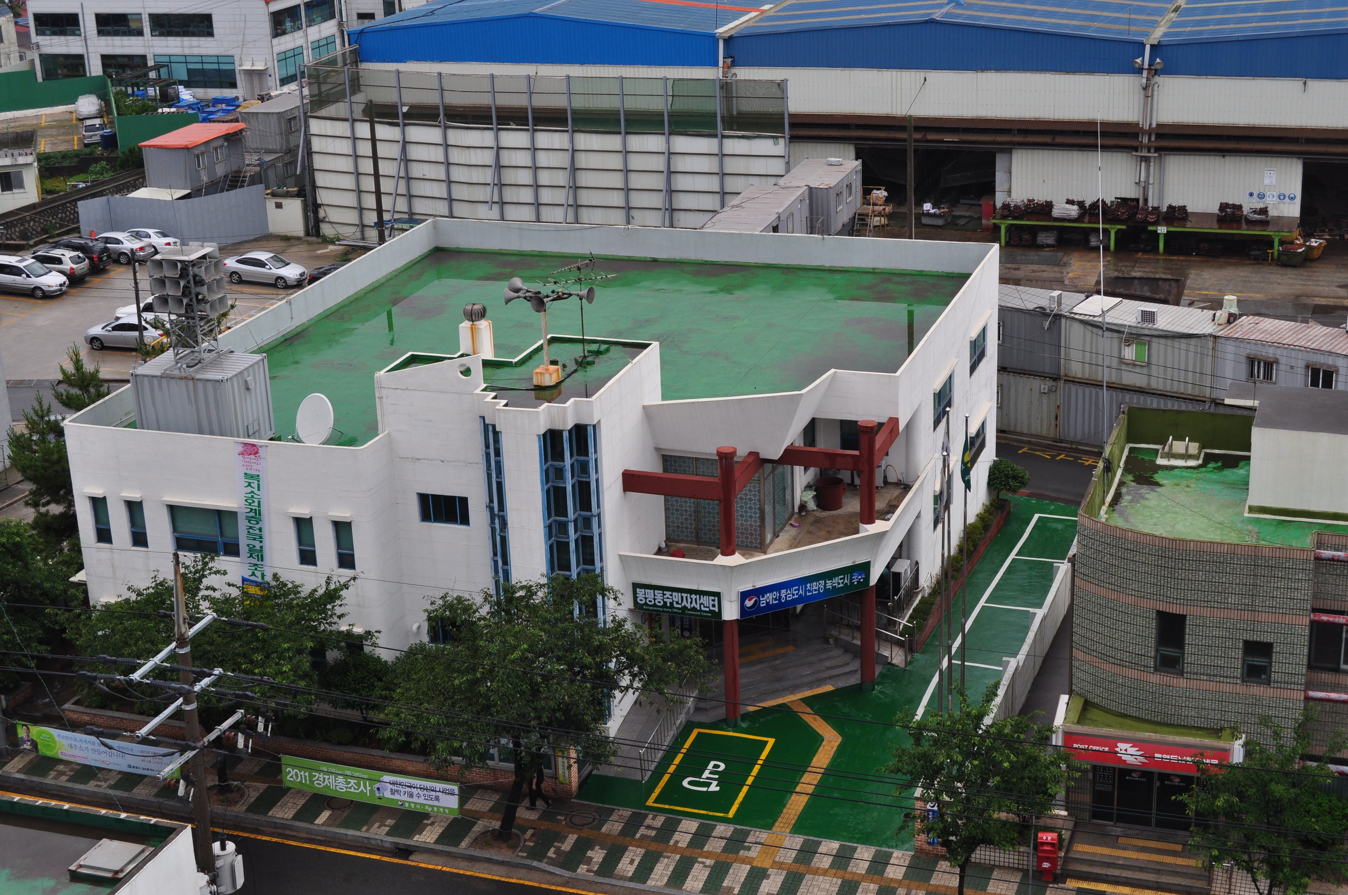 경남 통영시 봉평동 주민센터